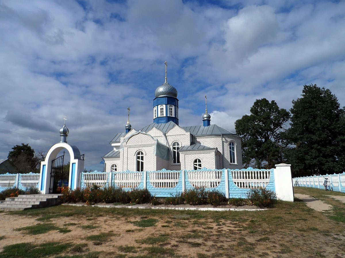 Снітава. Царква